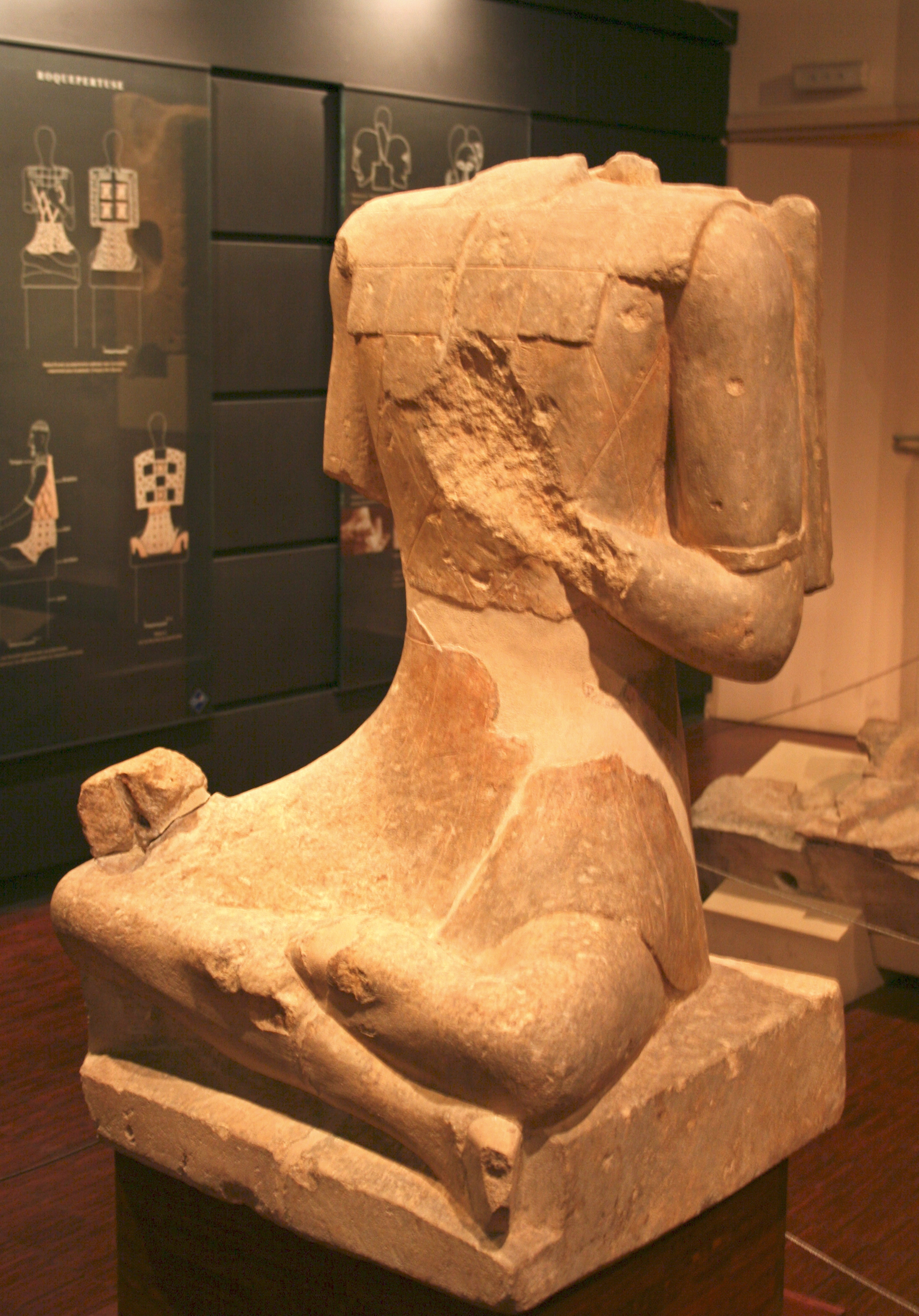 Roquepertuse (Bouches-du-Rhône), statue de guerriers assis en tailleur; il porte une chasuble à dessins géomètriques, IIIe-IIe siècle av. J.C.. hauteur=0.93 Longueur=0.58 épaisseur=0.67 exposé au musée d'archéologie méditerranéenne de la vieille Charité à Marseille.